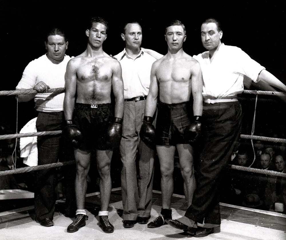 Gunnar Andersson, (to the left) boxer (1908-1971) in a match against František Nekolný (1907-1990) in Göteborg